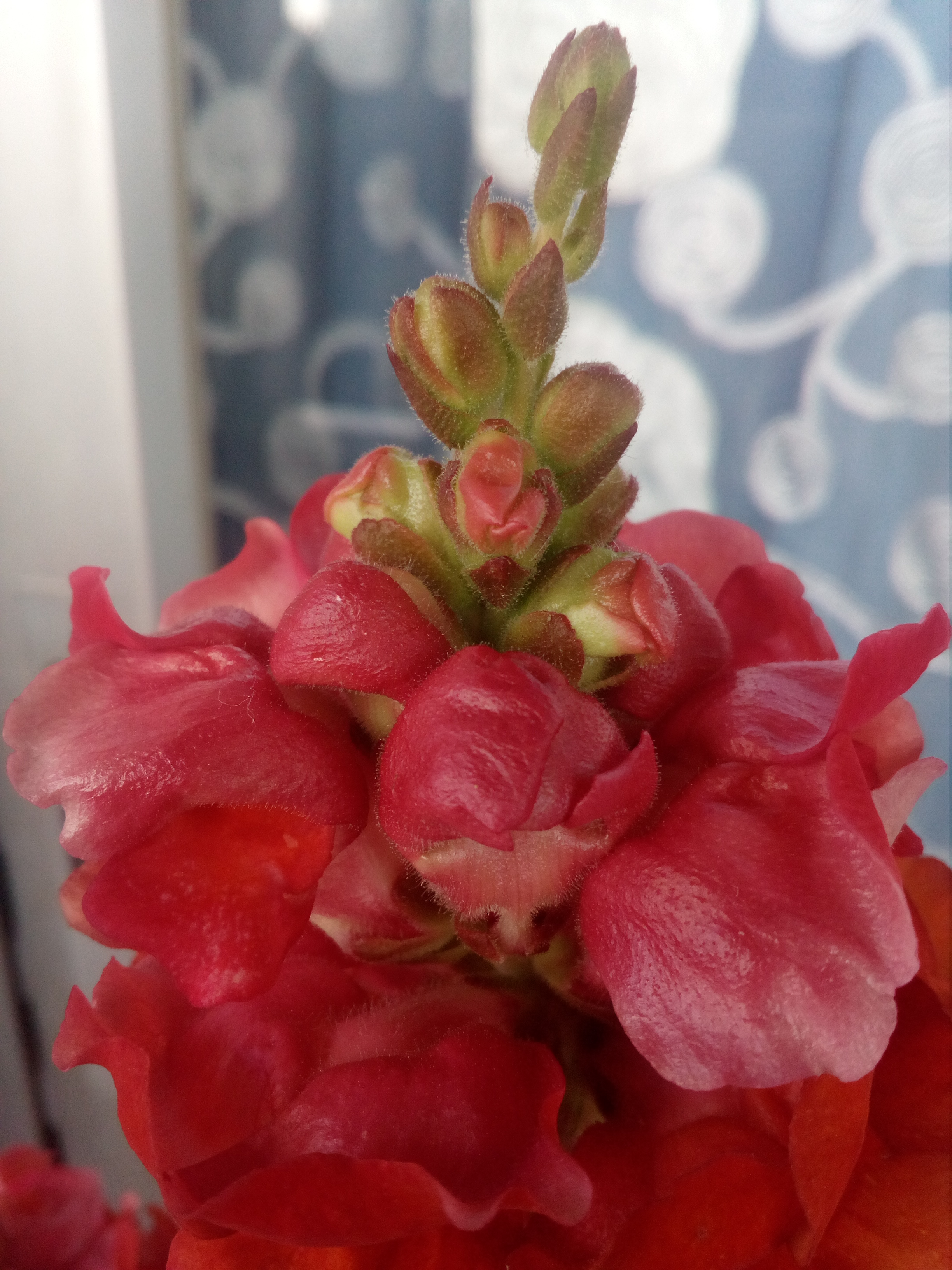 Σκυλάκι